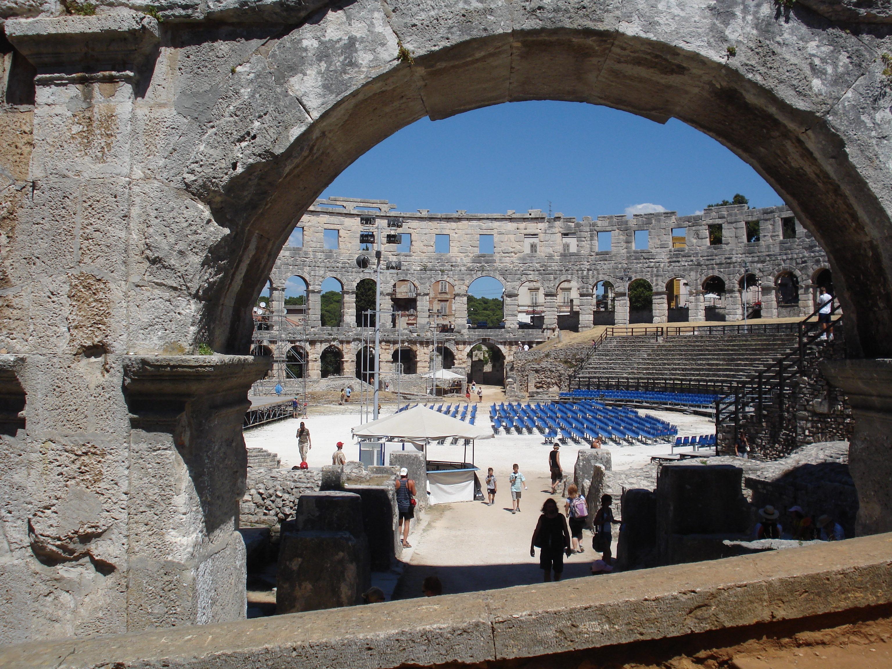 Pólai amfiteátrum, Horvátország